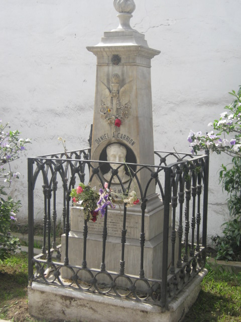 Tumba Daniel A. Carrion